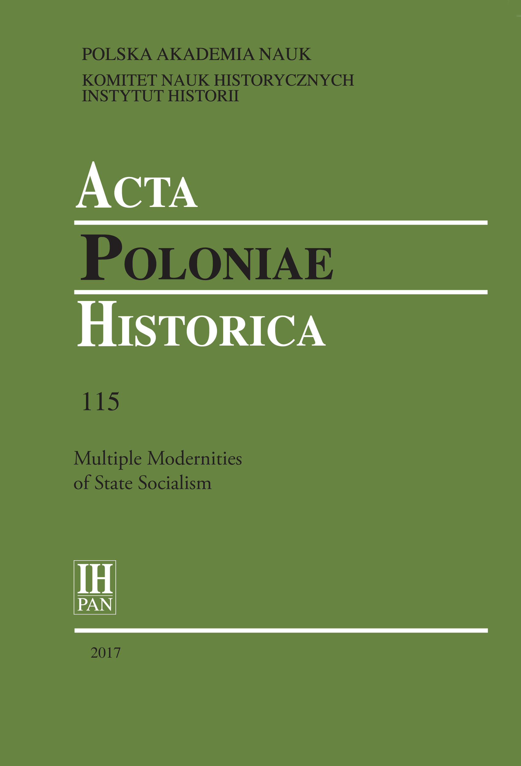 Acta Poloniae Historica